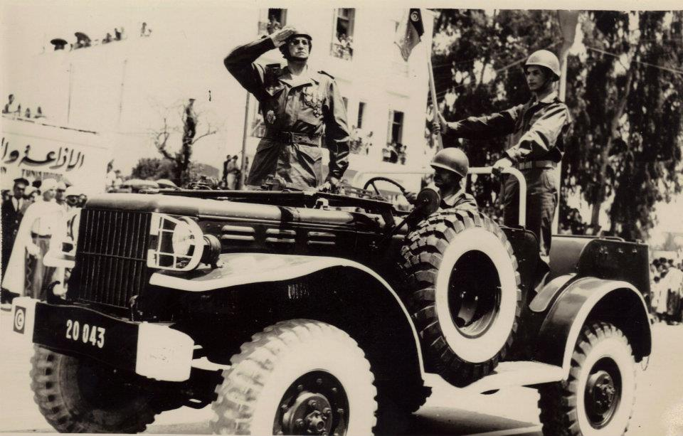 Mohamed Habib Essoussi à la tête du défilé du 1er juin 1971